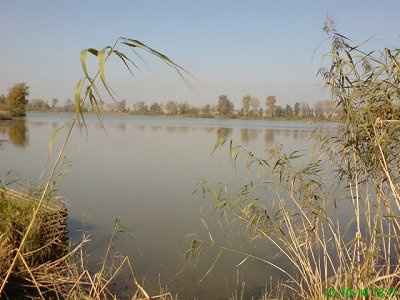 rybník Nový u háje